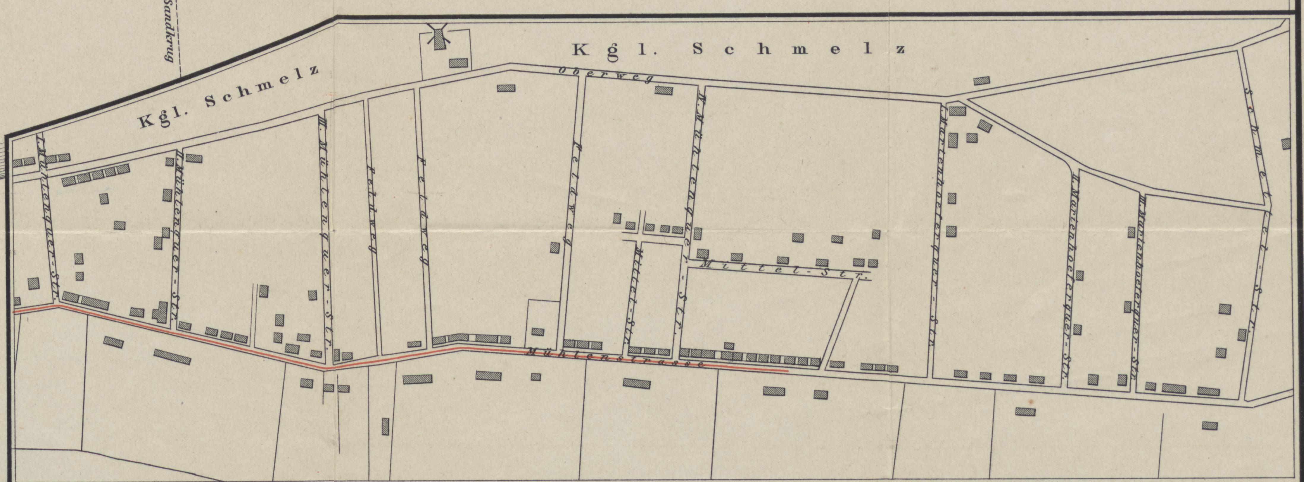 Litauen, Memelland, Stadtviertel